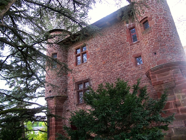 Château du XV ème et XVI ème siècle